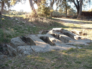 Prieuré de Ganagobie : anciennes tombes Description de l'image : photo personnelle pour illuster l'article sur Monastère_de_Ganagobie Source : Appareil photo numérique (Fuji FinePix 2400z) Statut : Image sans copyright je Utilisateur:Jeff1er estime que cette image est libre de droit